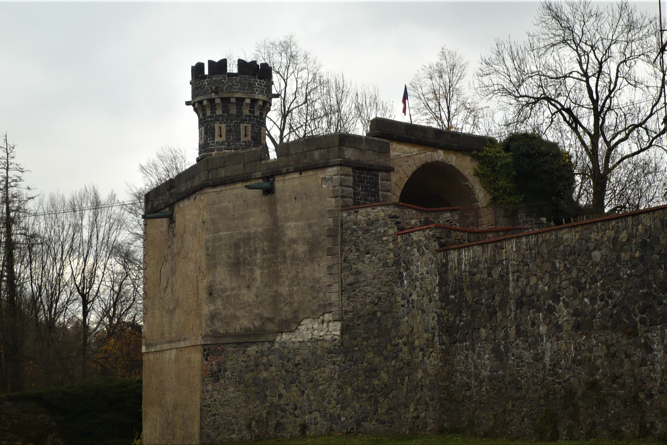 Frýdlant